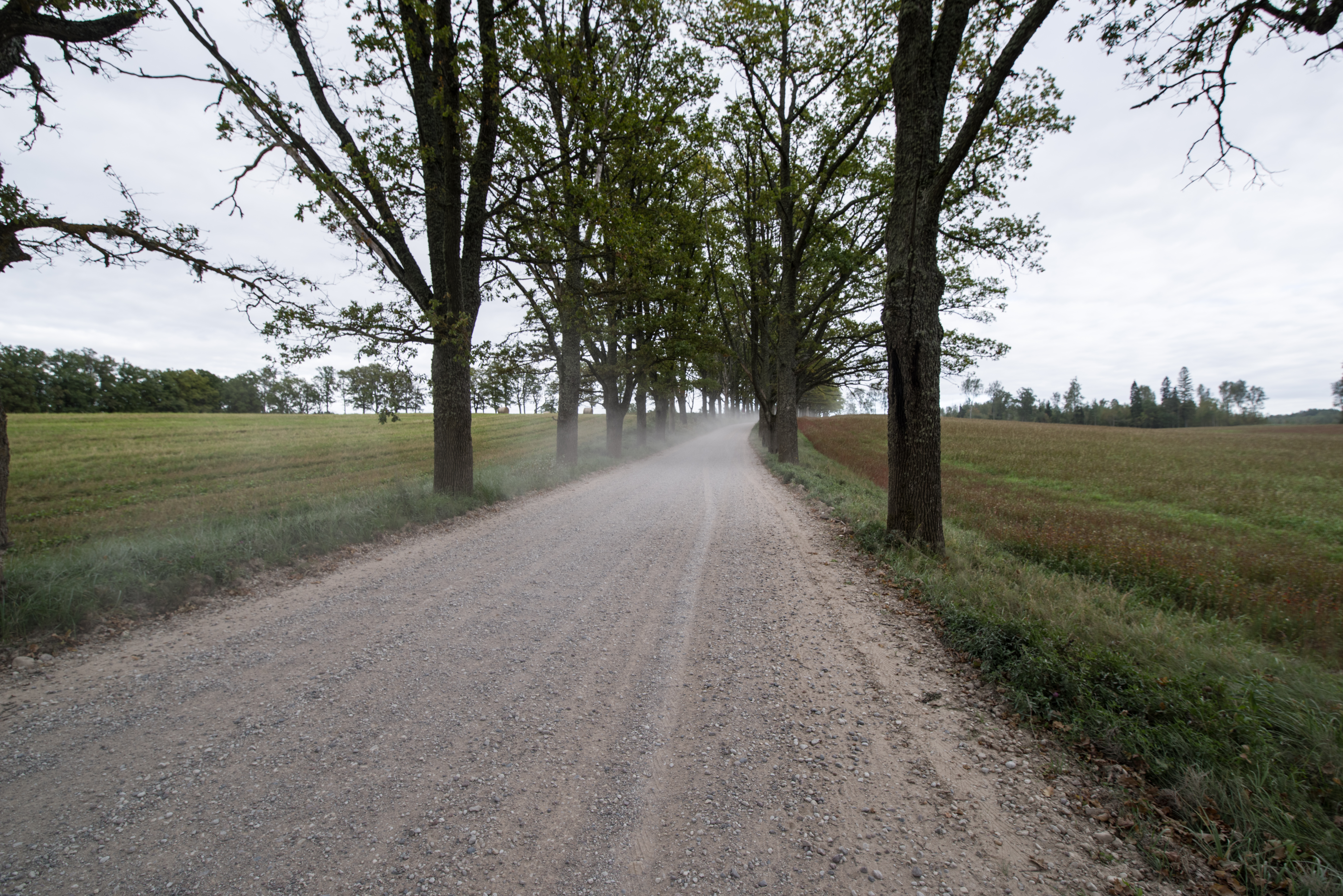 Drabeši parish, Latvia